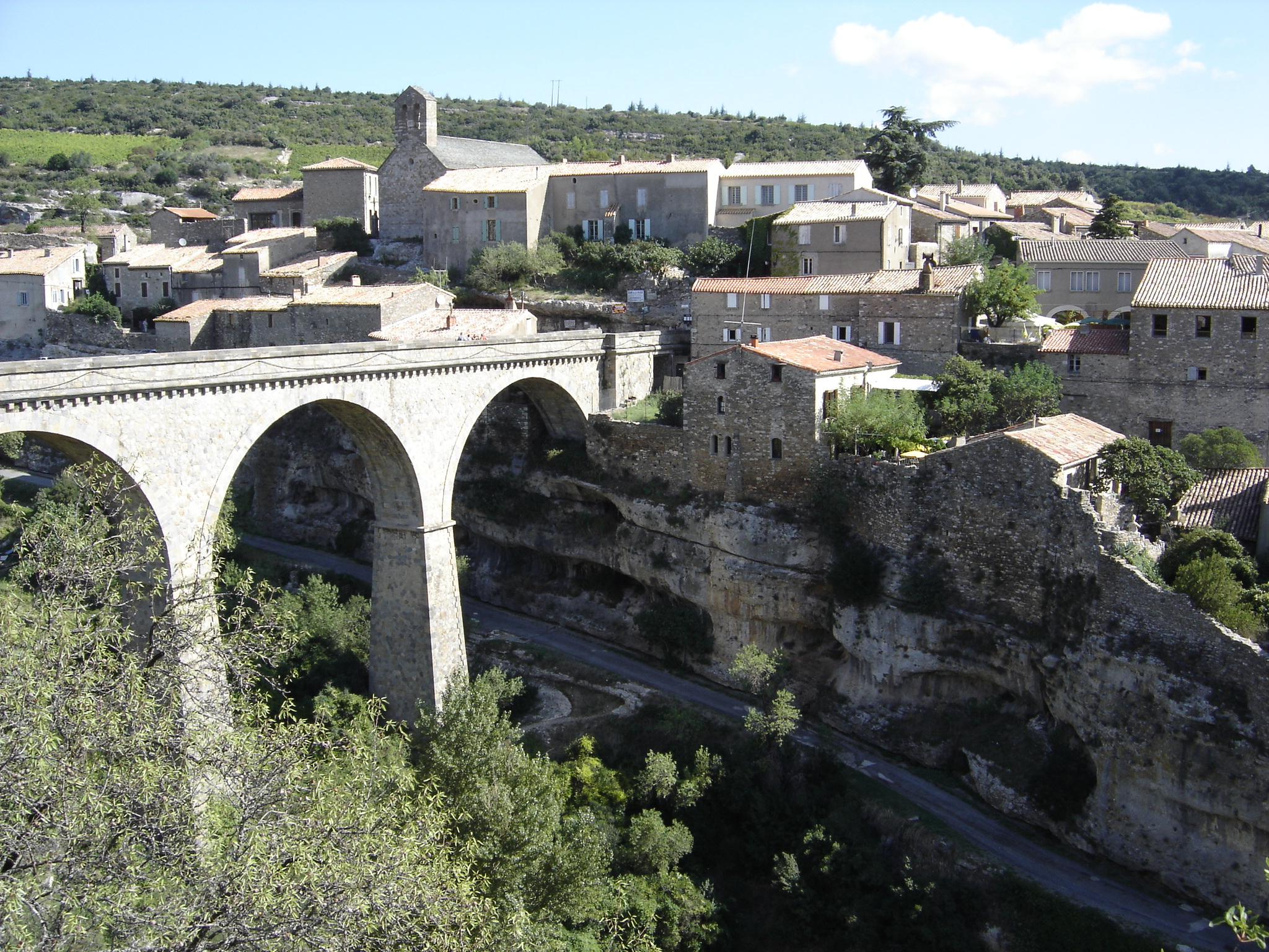 Minervois, Languedoc, France